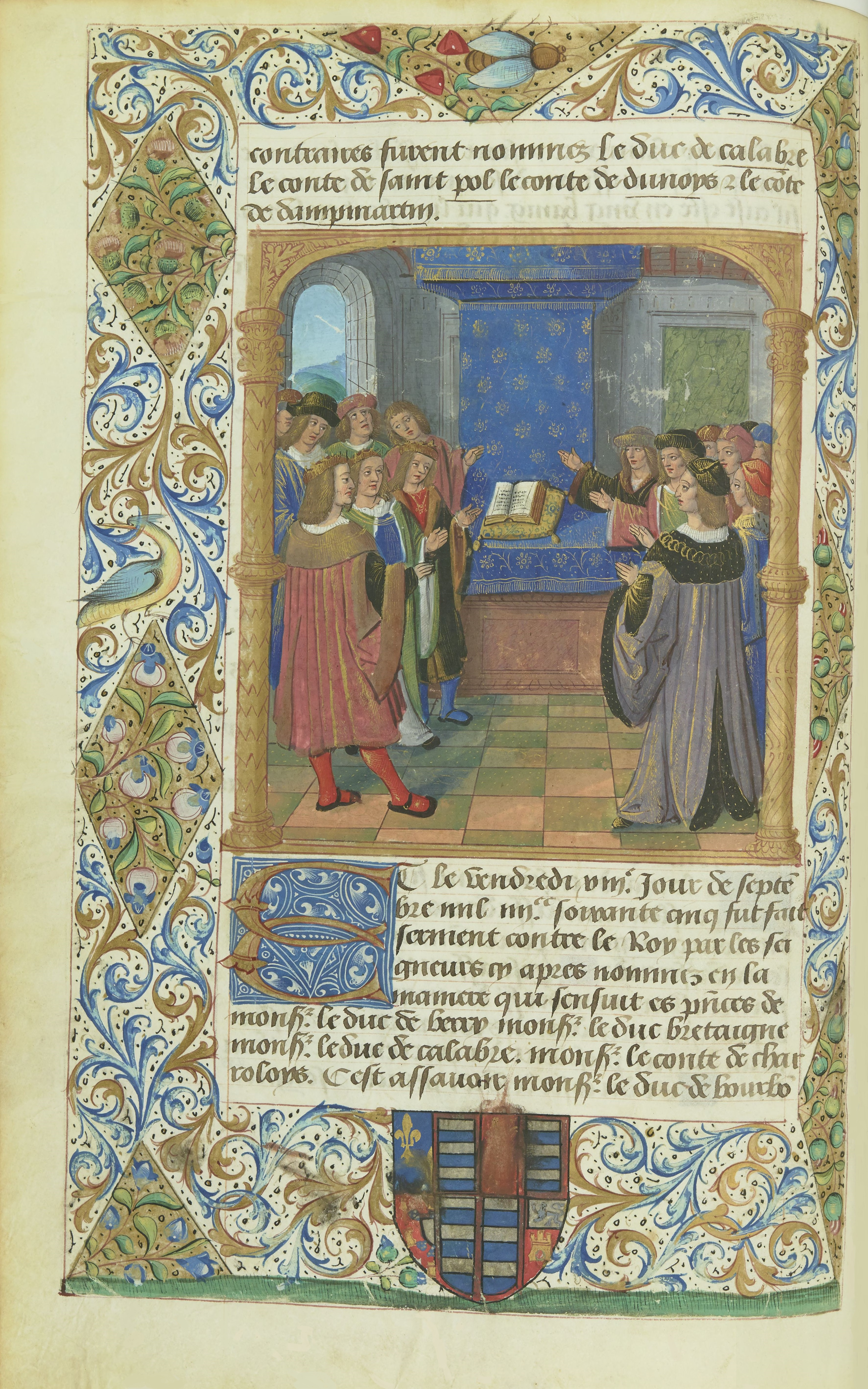 Le serment des princes durant la Ligue du bien public en 1465 (Jean de Roye, Chronique de Louis XI, dite Chronique scandaleuse, début du XVIe siècle).